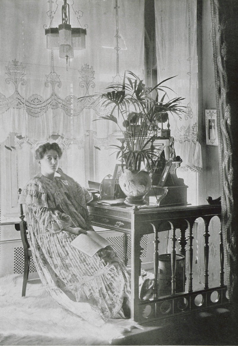 Gertrud Arnold, deutsche Schauspielerin (1873-1931), aufgenommen 1904.